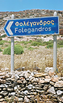 Titel: Folegandros Locatie: Folegandros, Griekenland Datum: juni 2004 Fotograaf: Gebruiker:IMFJ